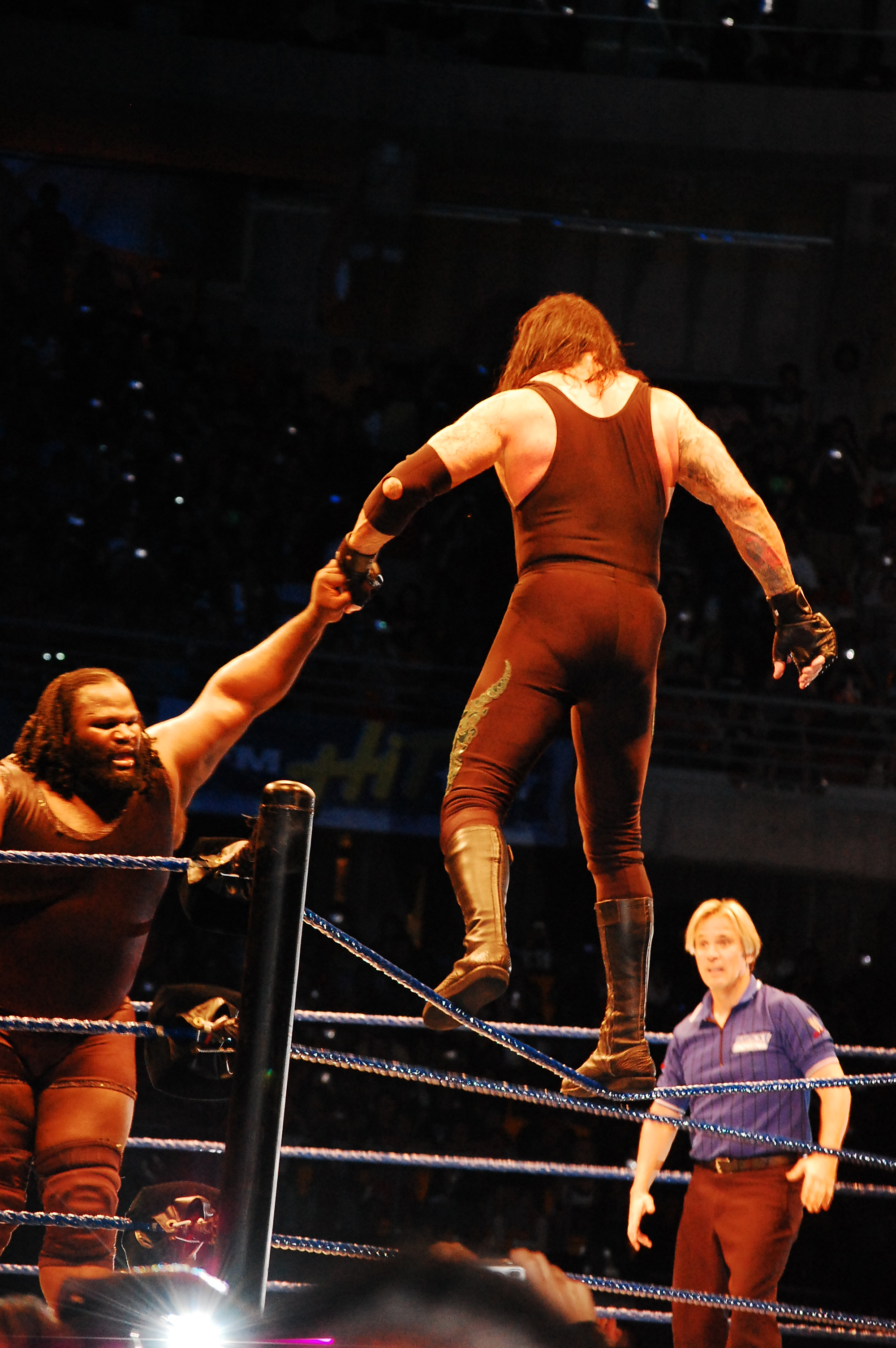 Cette photo a été prise le 14 février 2008 avec un Nikon D40. The Undertaker applique une prise aérienne nommée « Old School » à Mark Henry.